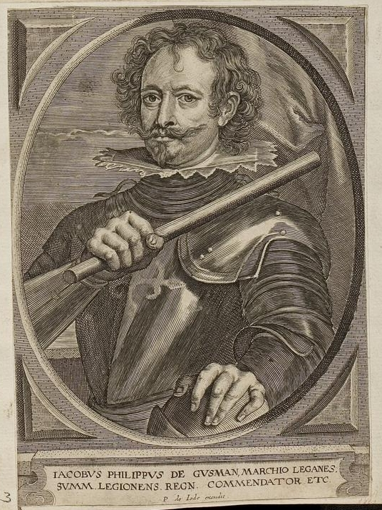 Grafik aus dem Klebeband Nr. 1 der Fürstlich Waldeckschen Hofbibliothek Arolsen Motiv: Diego Felipez de Guzmán